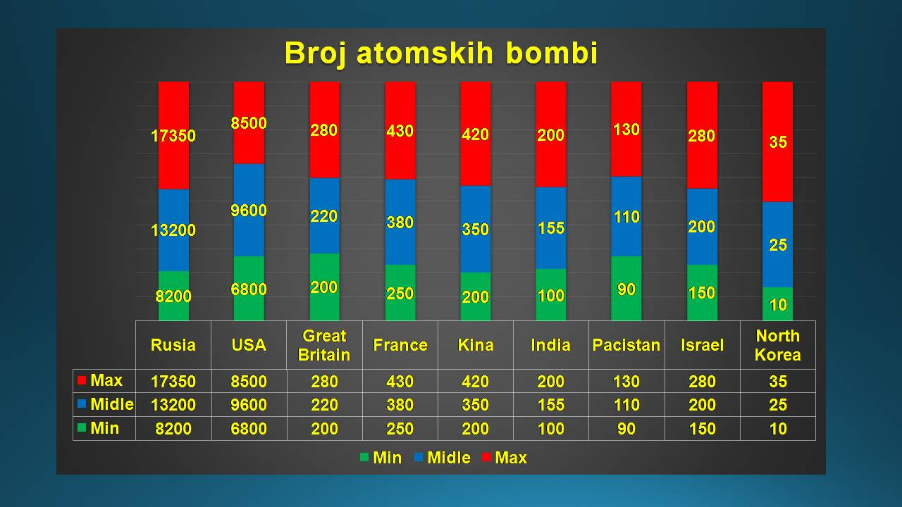 Српски (ћирилица): На слици је приказан број атомских бомбу